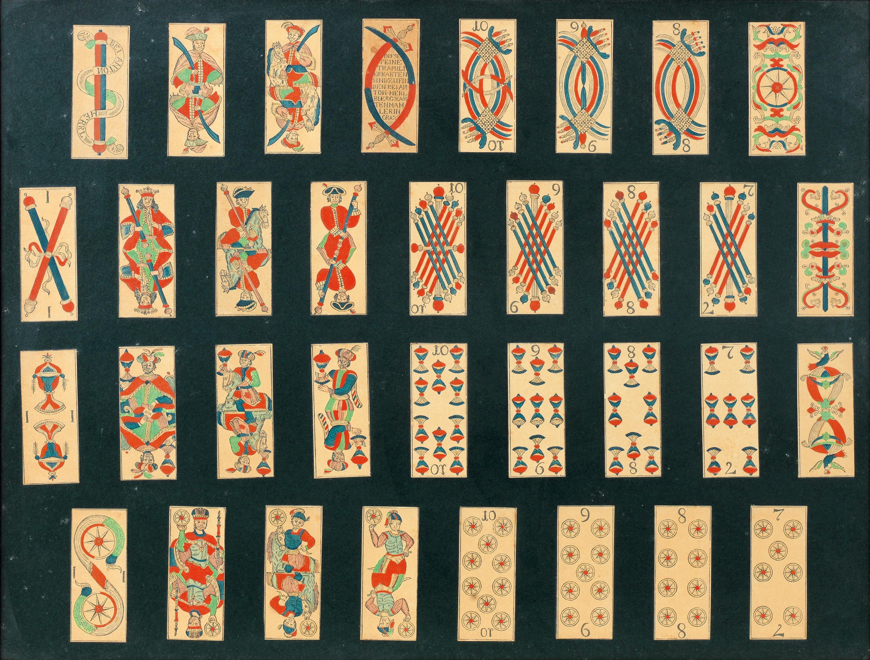 Tarock-Trapulierkarten, 34 Spielkarten mit handkolorierten Kupferstichen, je 14 x 6 cm